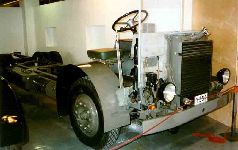 Scania-Vabis 8422/4 Buschassi 1939